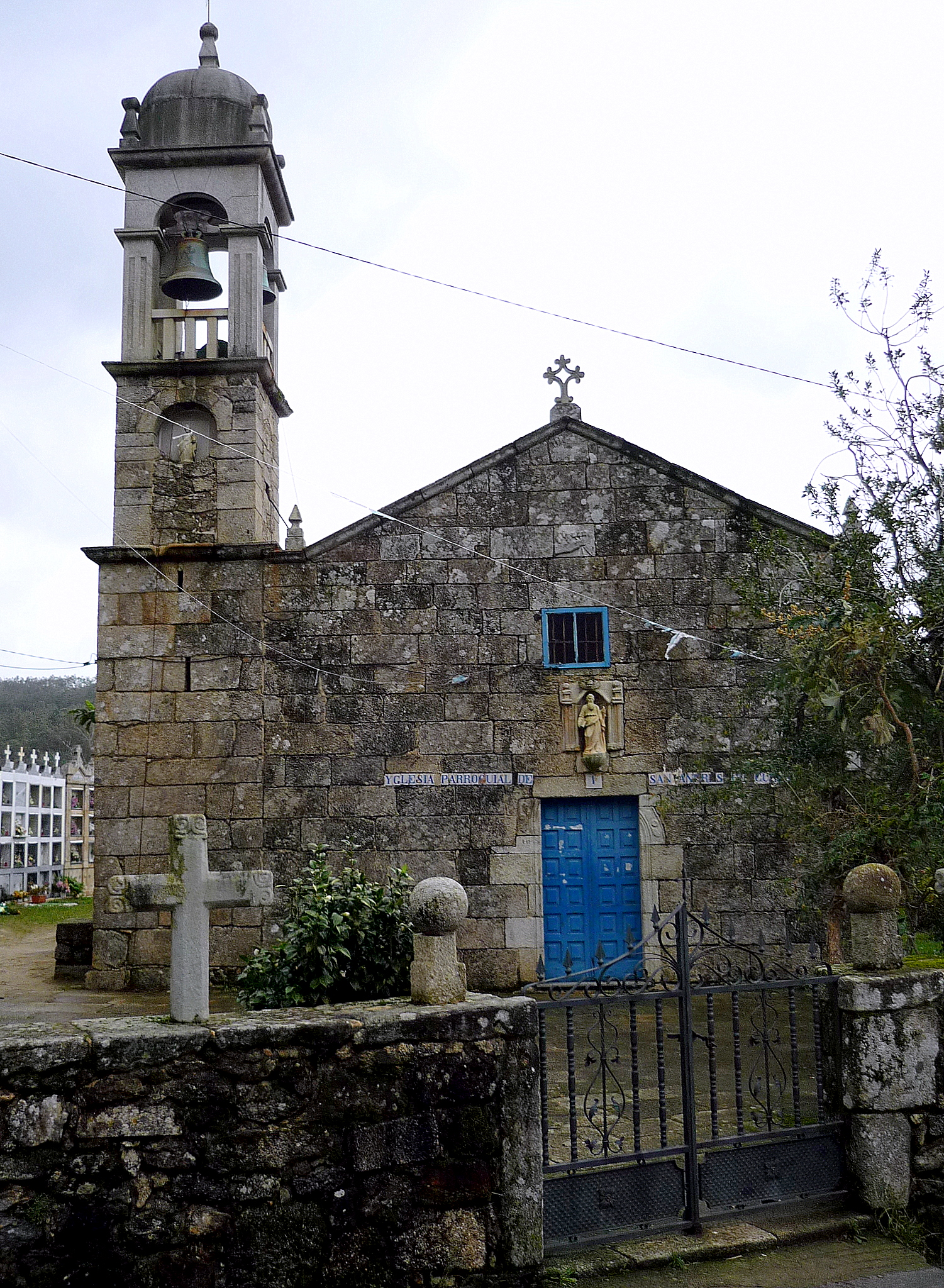 Cures, Santo André de Cures, Boiro, igrexa parroquial